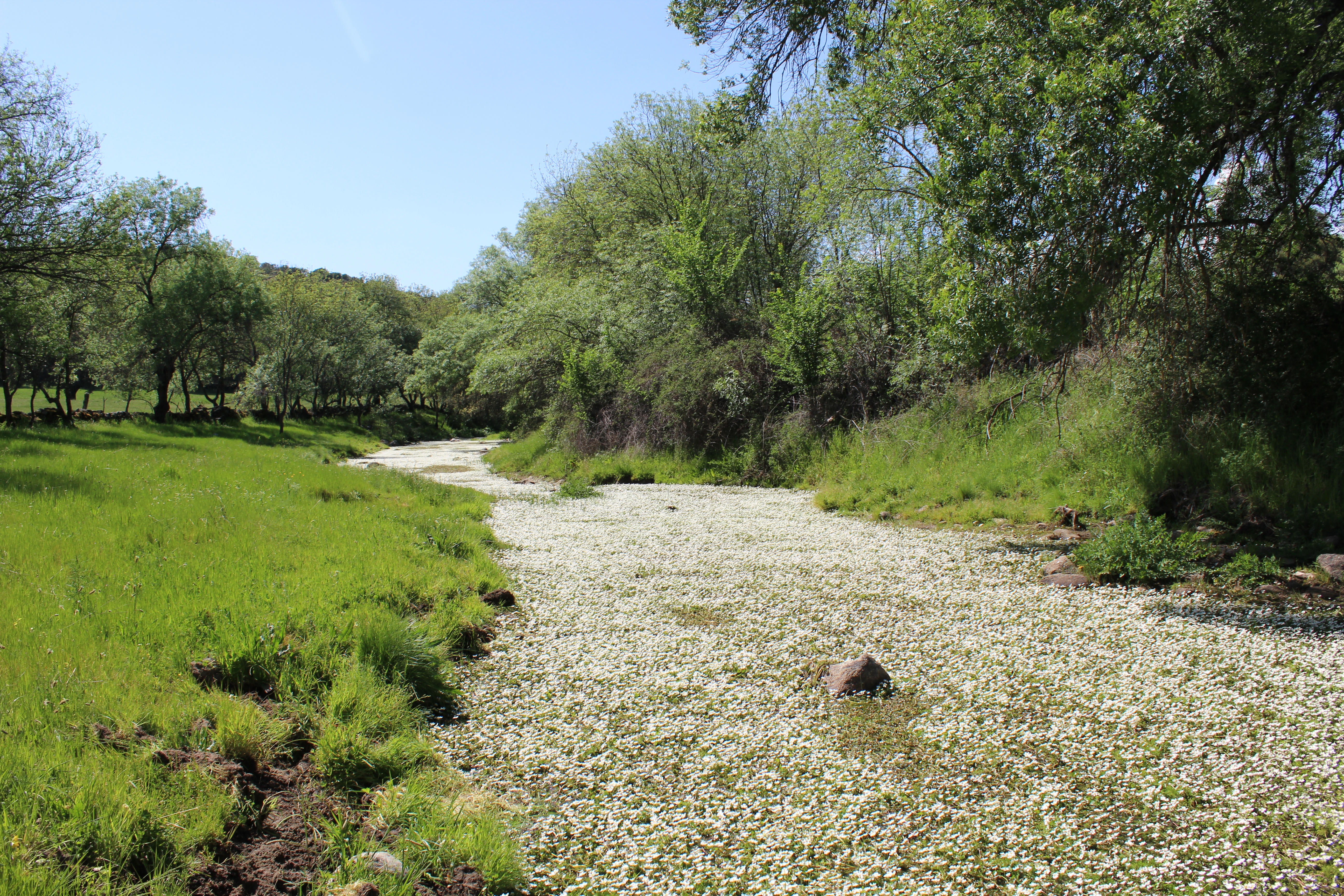 Vista de la Garganta Torinas, provincia de Toledo.